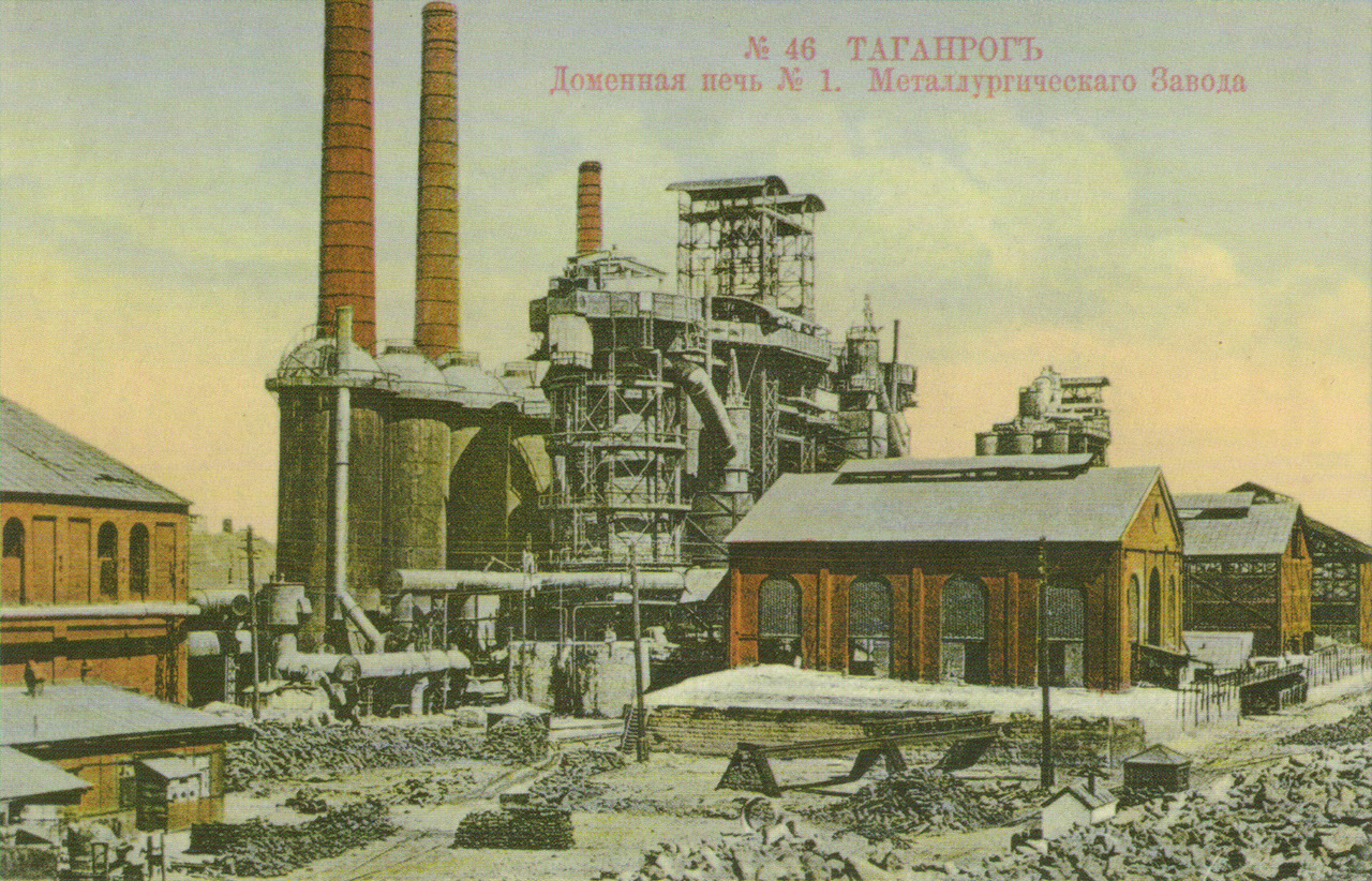 Таганрог. Металлургический завод. Доменная печь №1